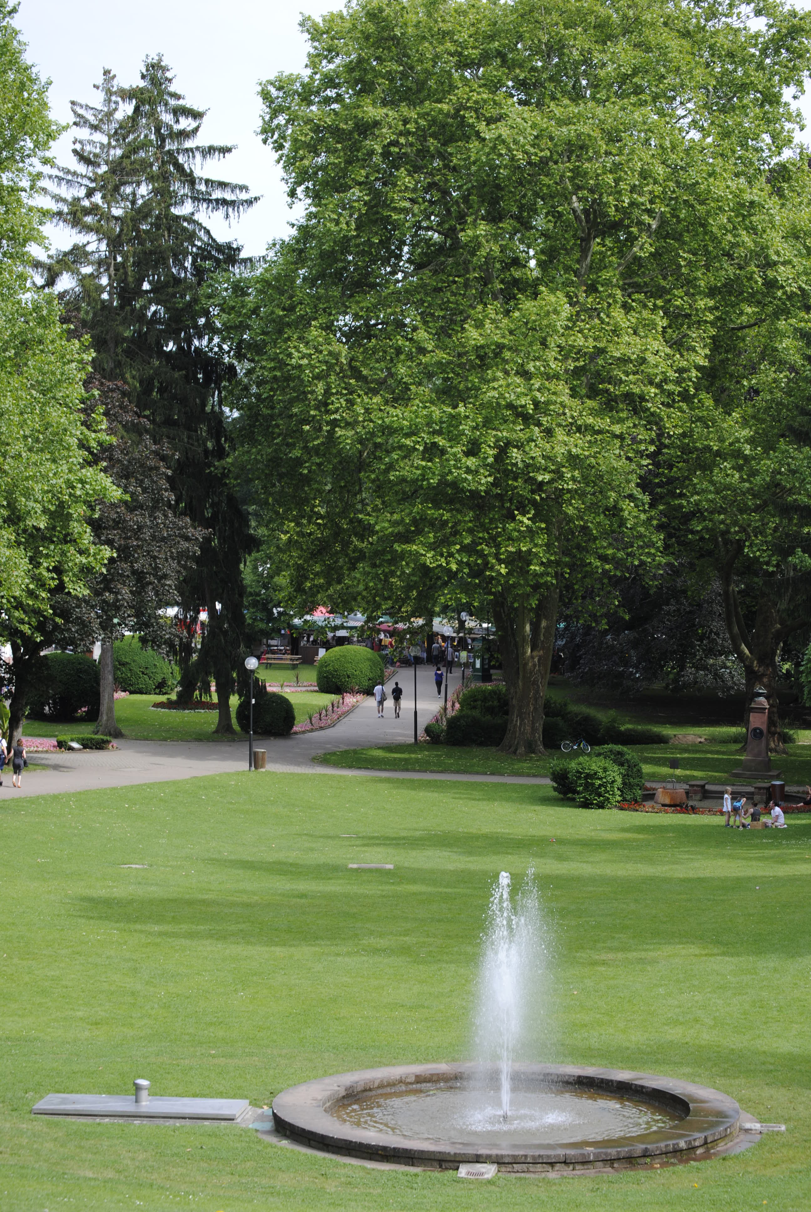 Blick von der Kurhausterasse auf den Alten Kurpark